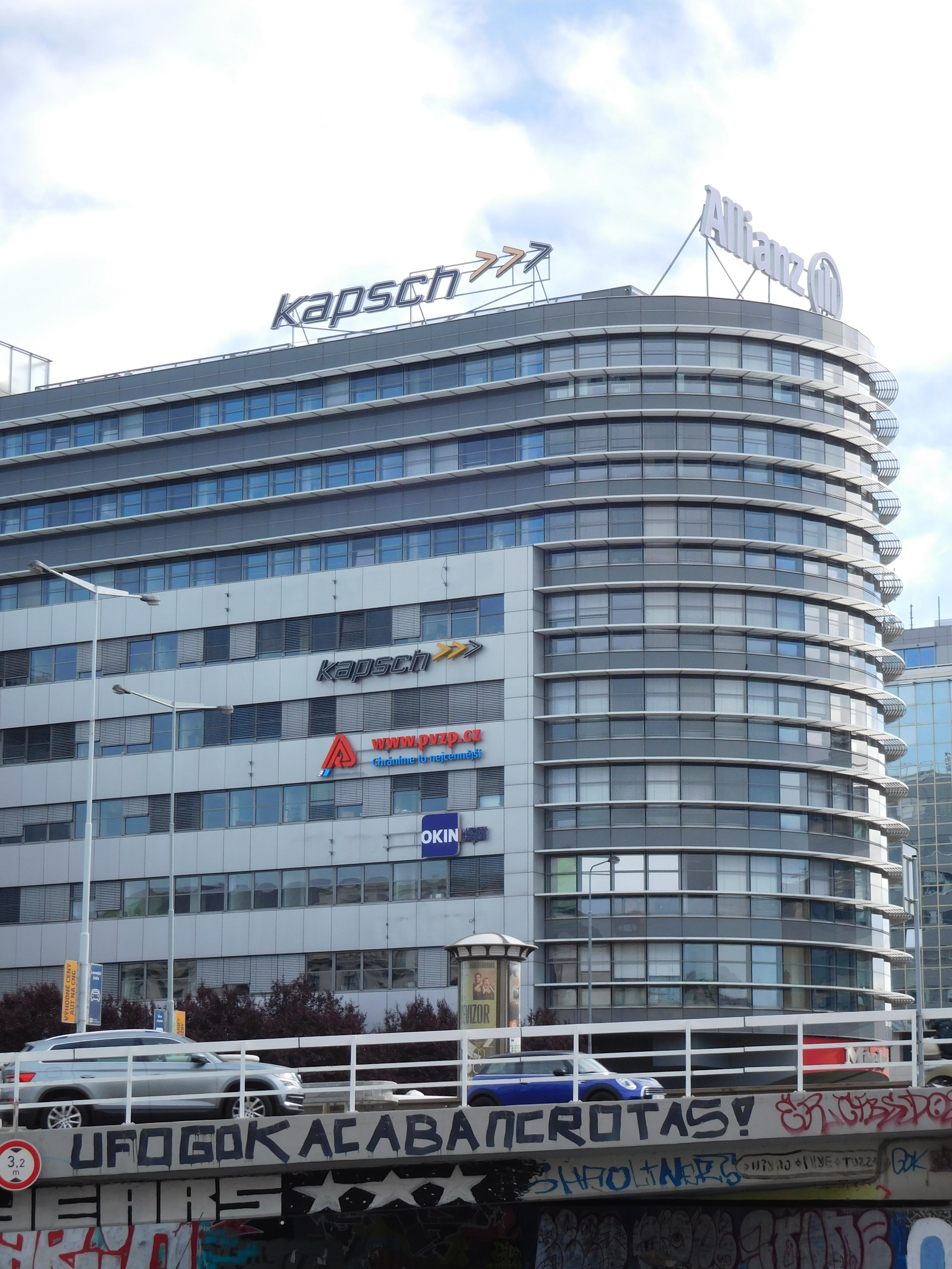 Praha - Karlín, Ke Štvanici 3, Diamond Point (pohled z Těšnova)